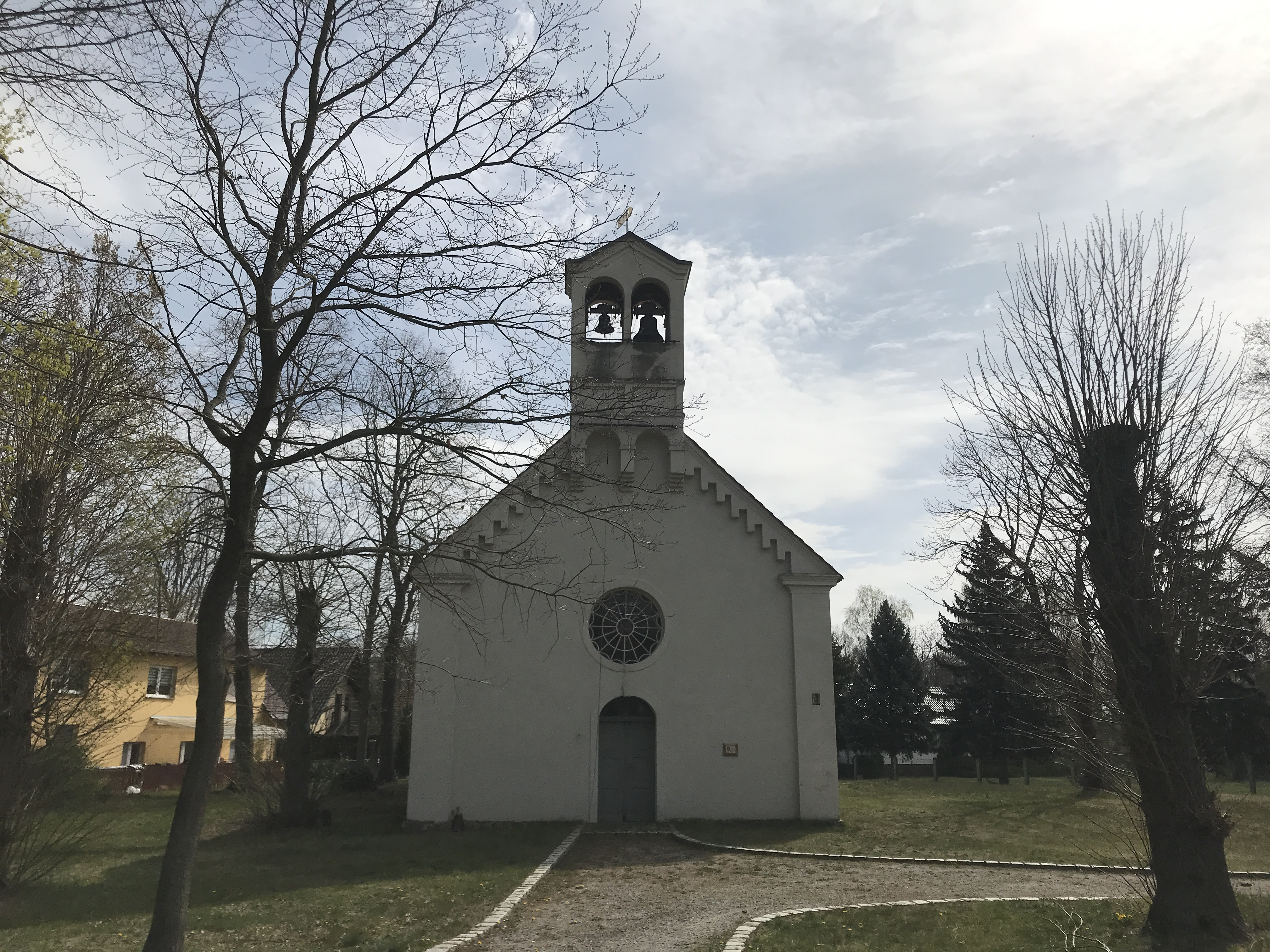 Die Dorfkirche Wüstenhain ist eine Saalkirche aus den 1860er Jahren in Wüstenhain, einem Gemeindeteil des Ortsteils Laasow der Stadt Vetschau/Spreewald im Landkreis Oberspreewald-Lausitz.